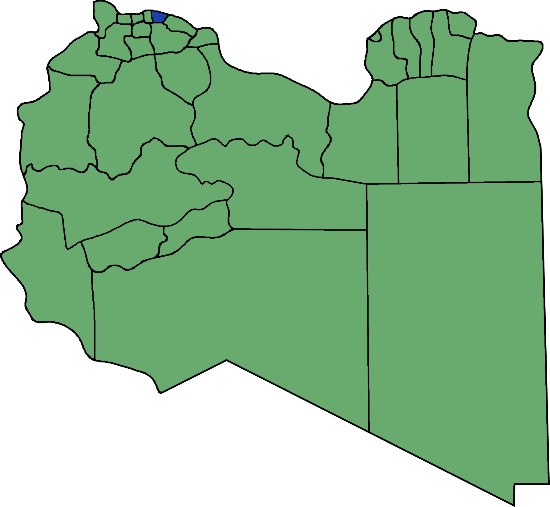 Die neuen Gemeinden (Munizipien) in Libyen. Tajura Wa Al Nawahi Al Arba hervorgehoben.